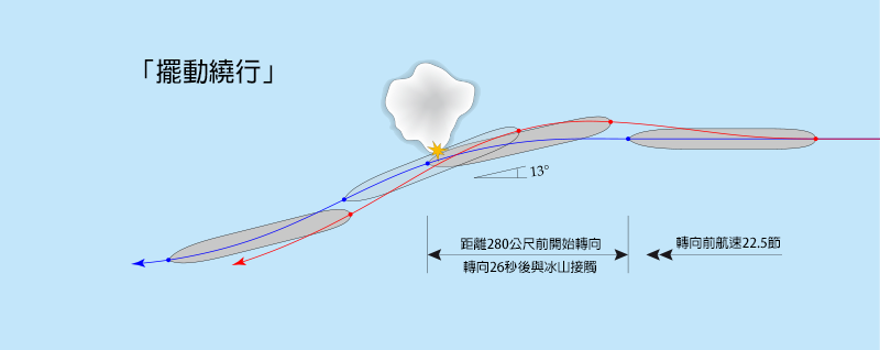 英國皇家郵輪鐵達尼號「擺動繞行」圖示（註釋中文版），藍色為船首的路徑；紅色為船尾的路徑。